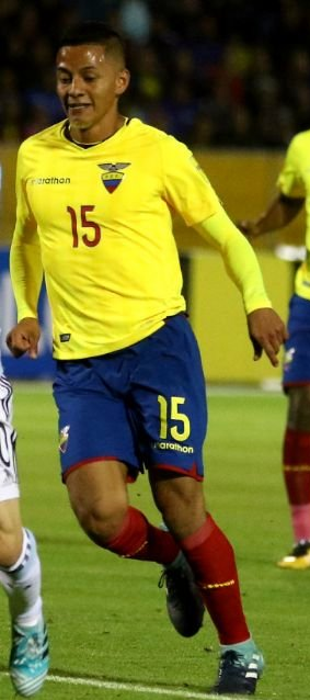 Quito, 10 oct (Andes).- Con tres tantos Argentina espantó los fantasmas de la eliminación, clasificó a su décima octava Copa del Mundo y venció 3-1 a un Ecuador que inició ganando el compromiso, disputado en el estadio Atahualpa de Quito, pero que no supo contener a uno de los mejores jugadores del mundo. ANDES/Micaela Ayala V.